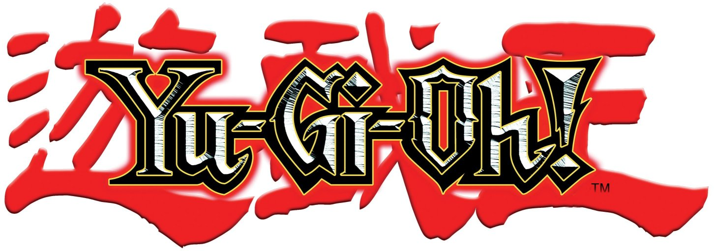 Logo oficial de la serie de anime de Yu-Gi-Oh!.